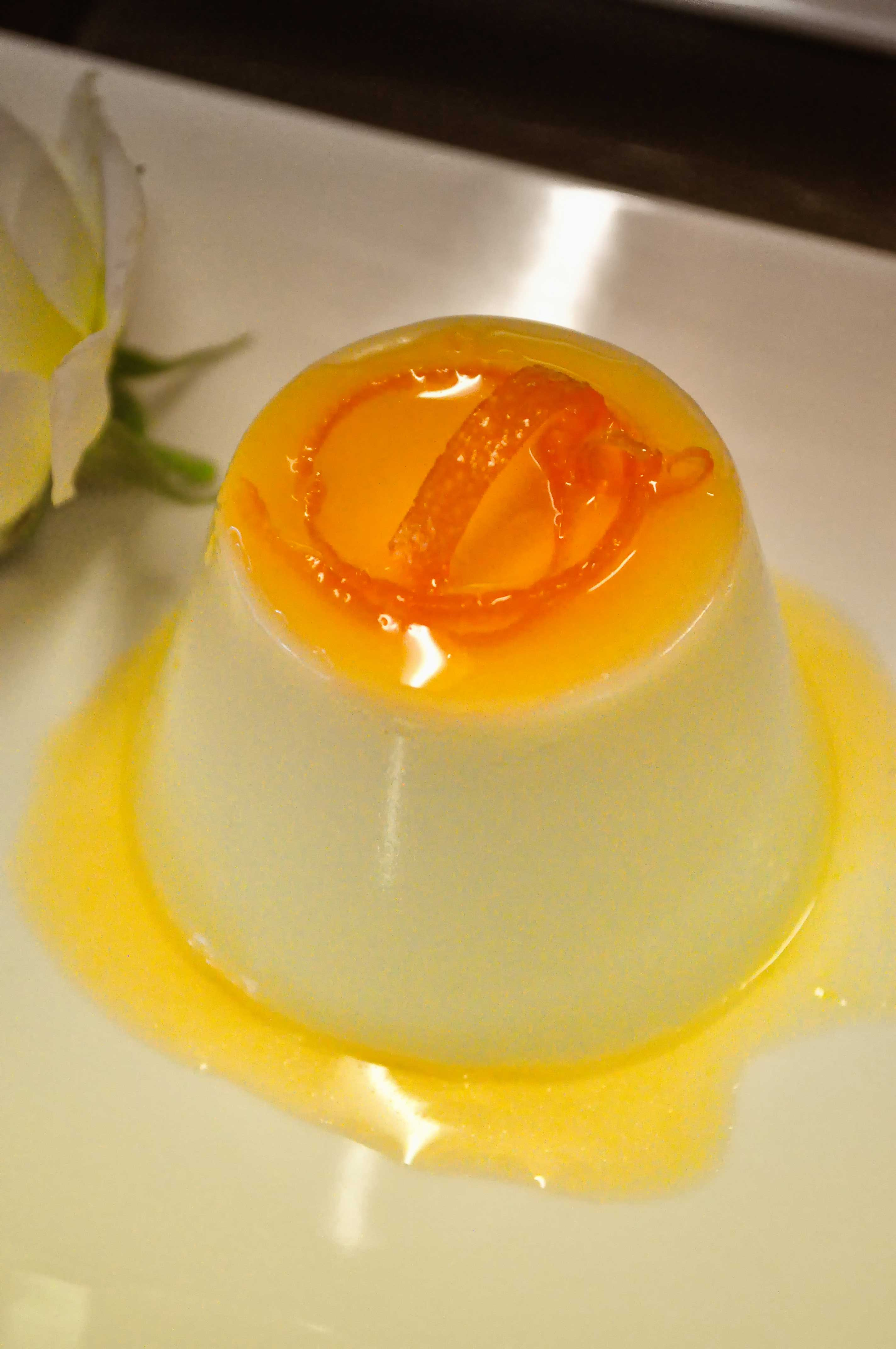 Citrus Panna Cotta